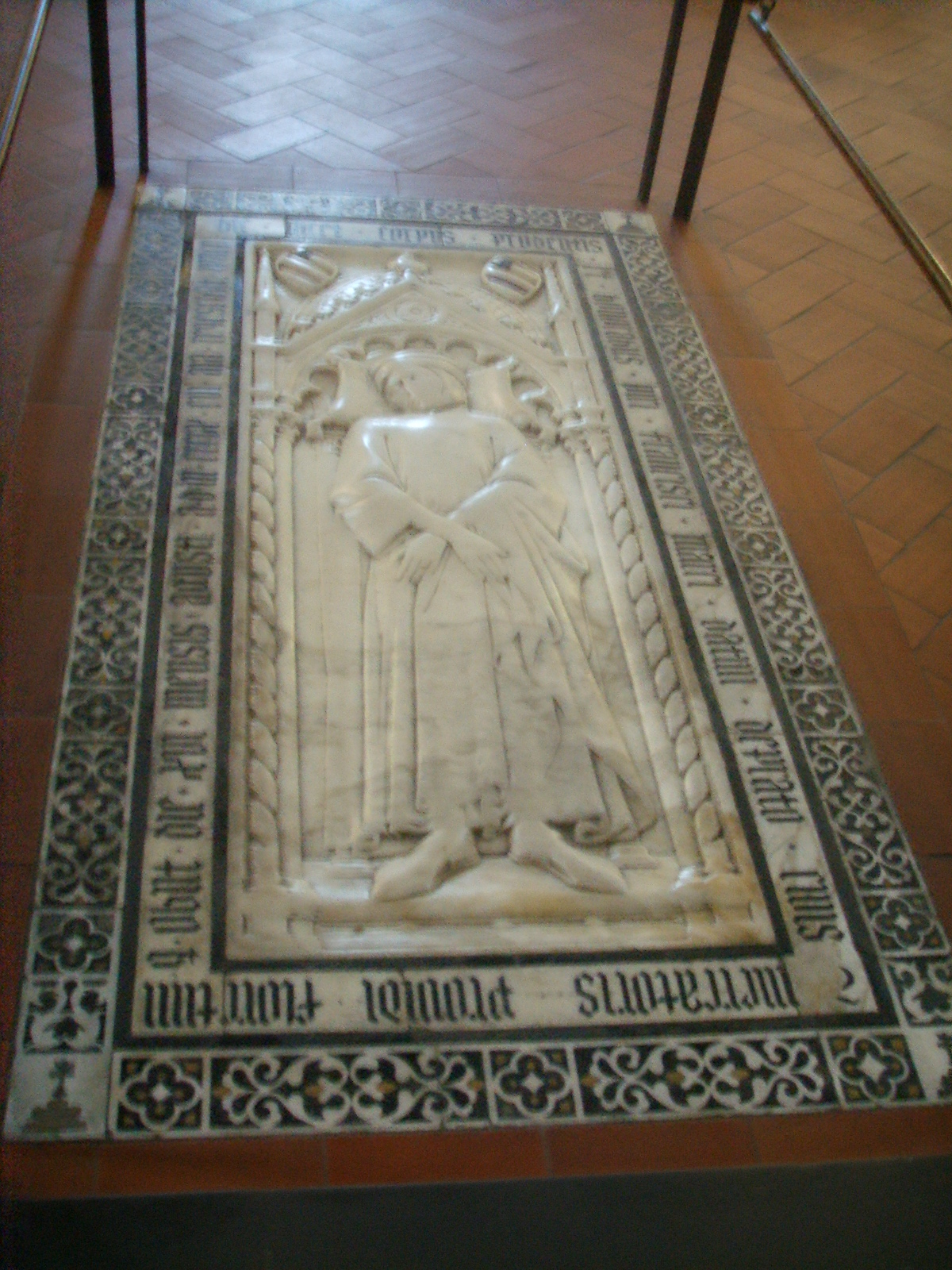 Chiesa_di_San_Francesco,_inside in Prato